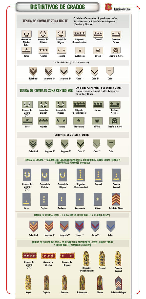 Jerarquias del Ejercito de Chile